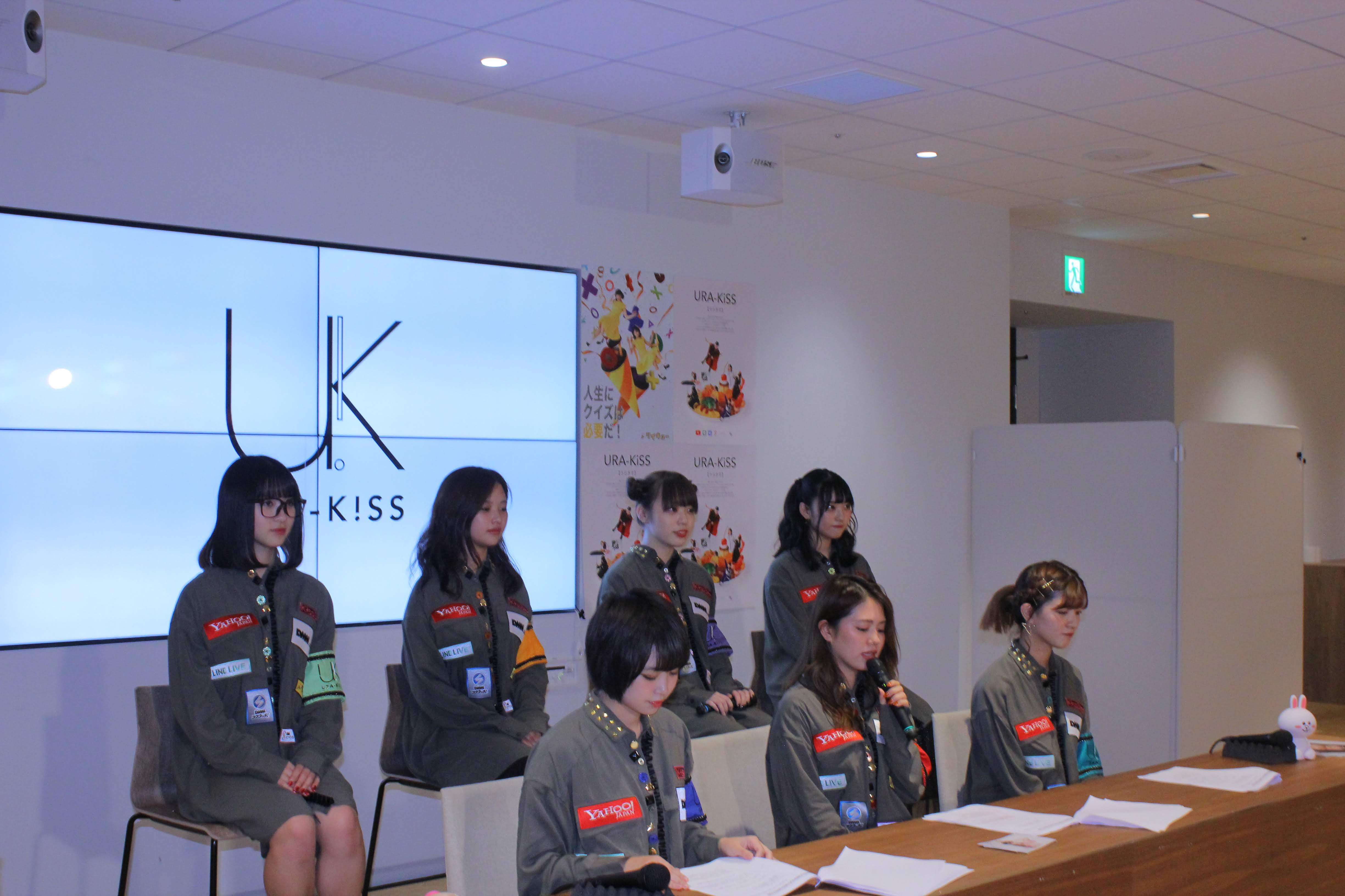 2019年7月25日にDMM本社で行なわれたURA-KISS(うらきす)プレスカンファレンスでの様子。YouTubeで生中継された。